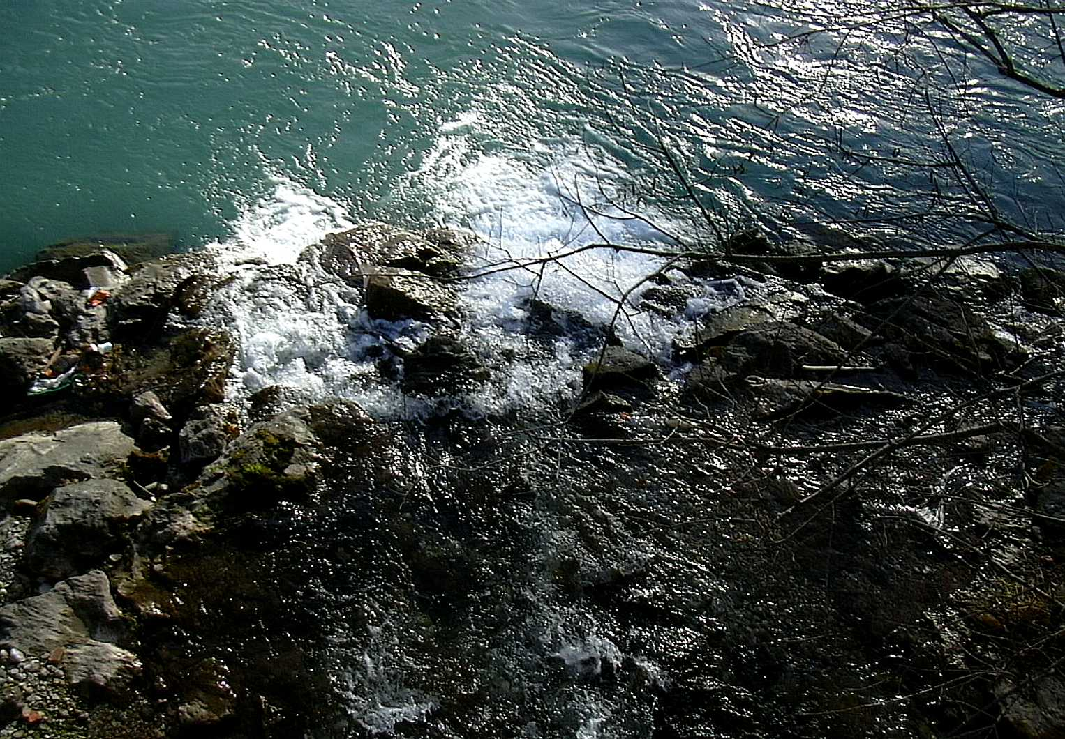 Mühlauer Bach Mouth